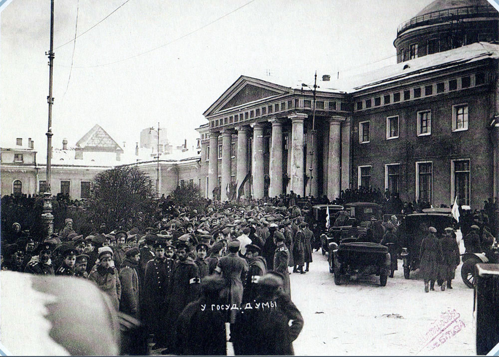 У Таврического дворца в день открытия первого заседания совета рабочих и солдатских депутатов (2 марта 1917)